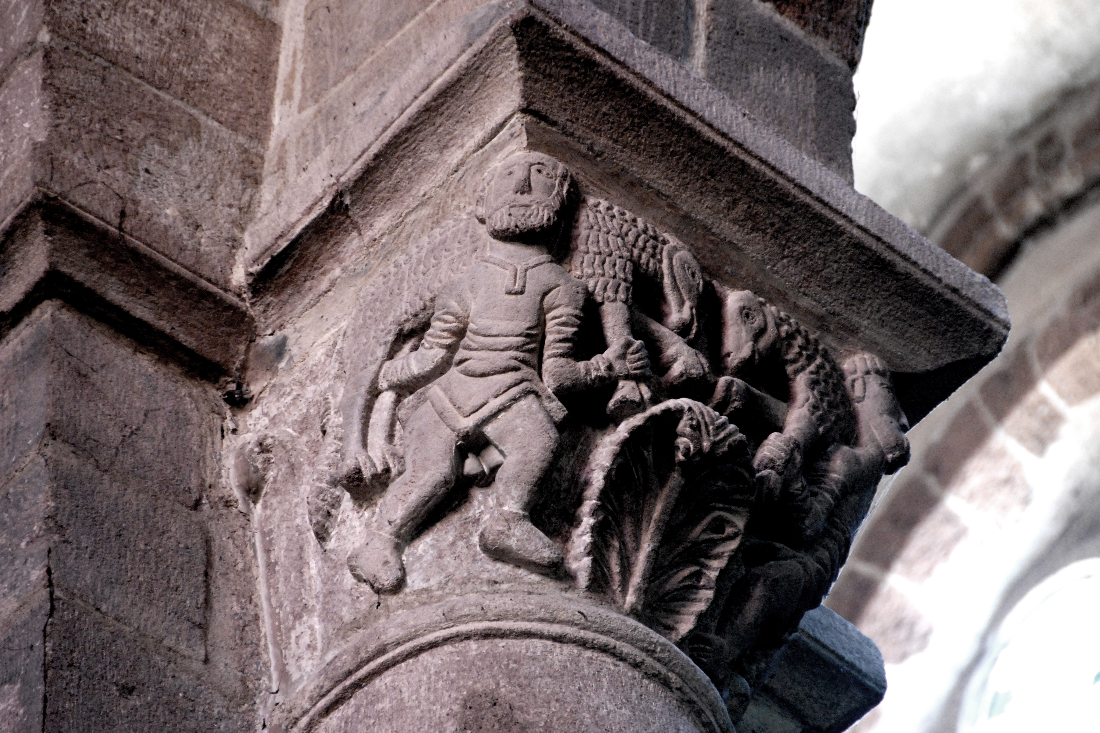 St.-Julien Brioude, Schafträger, bärtig